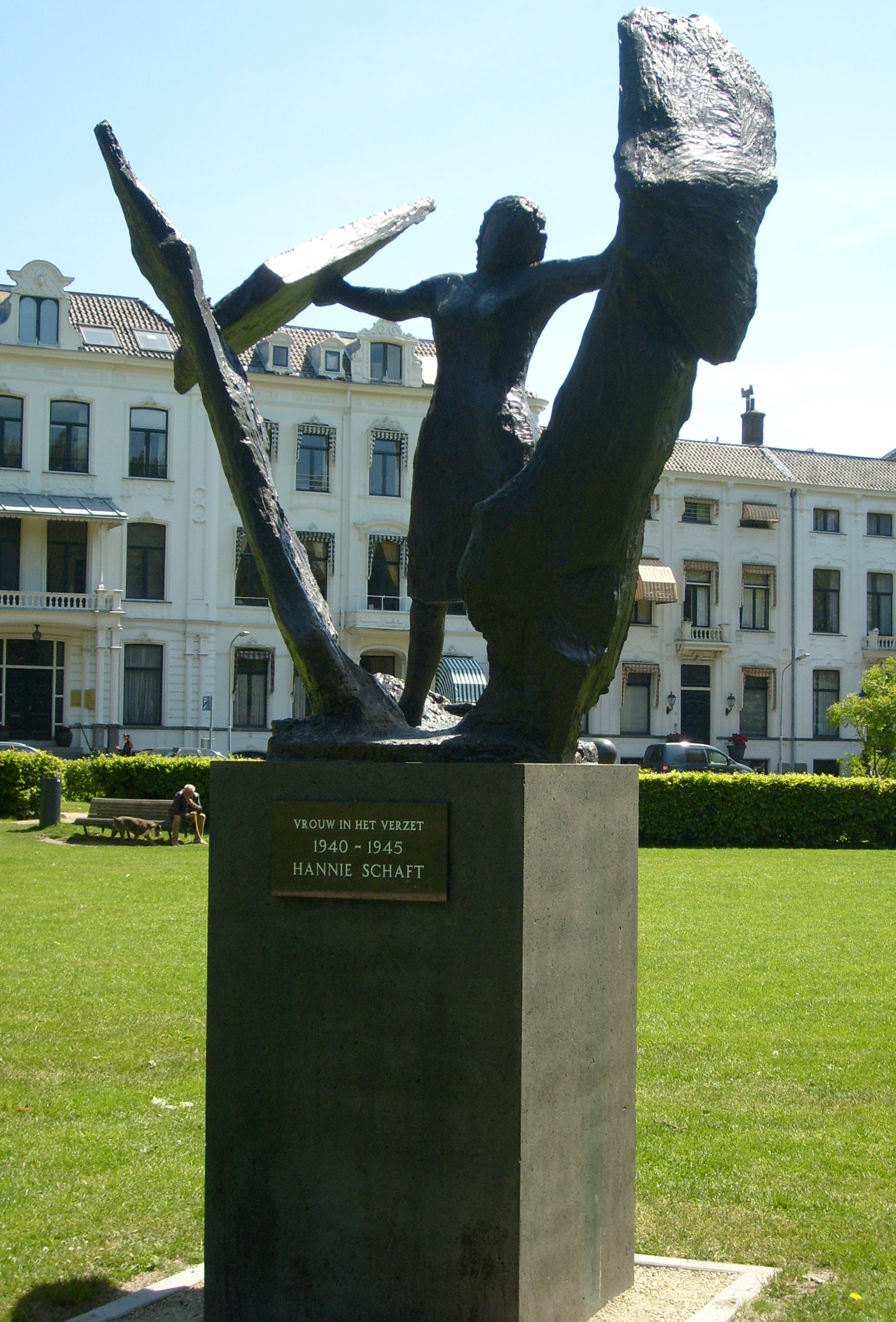 Hannie Schaft, Vrouw in het Verzet, door Truus Menger-Oversteegen, 1982, materiaal: Brons. Locatie: Kenaupark